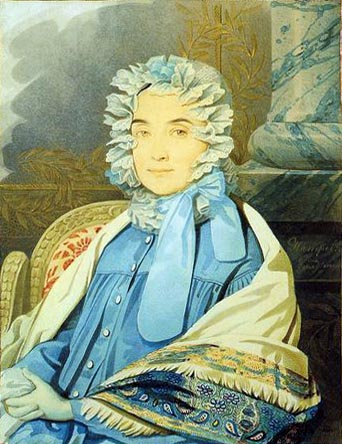 Наталья Петровна Глебова-Стрешнева (1804—19.05.1881), с 1839 года замужем за Федором (Фридрих) Логгиновичем Бреверном (1799 — после 1863), штабс-ротмистр лейб-гвардии Конного полка. Умерла от катара желудка в Висбадене, похоронена там же на православном кладбище.